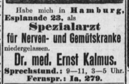 Zeitungsanzeige von Dr. med. Ernst Kalmus